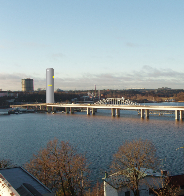 "Stockholmsfyrens" ungefärliga utseende vid Ropsten med vy från hotell Forestas entréplan på Lidingö. Det runda 187 m höga tornet innehållande både bostäder och kontorslokaler är föreslaget att uppföras omkring 2014-2015.